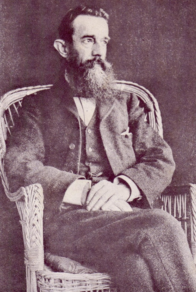 D’Arbez